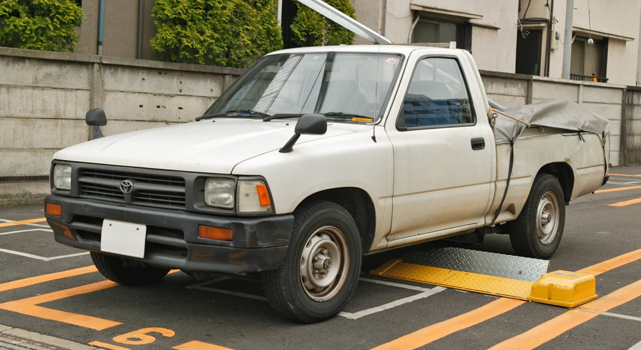 Toyota Hilux YN80